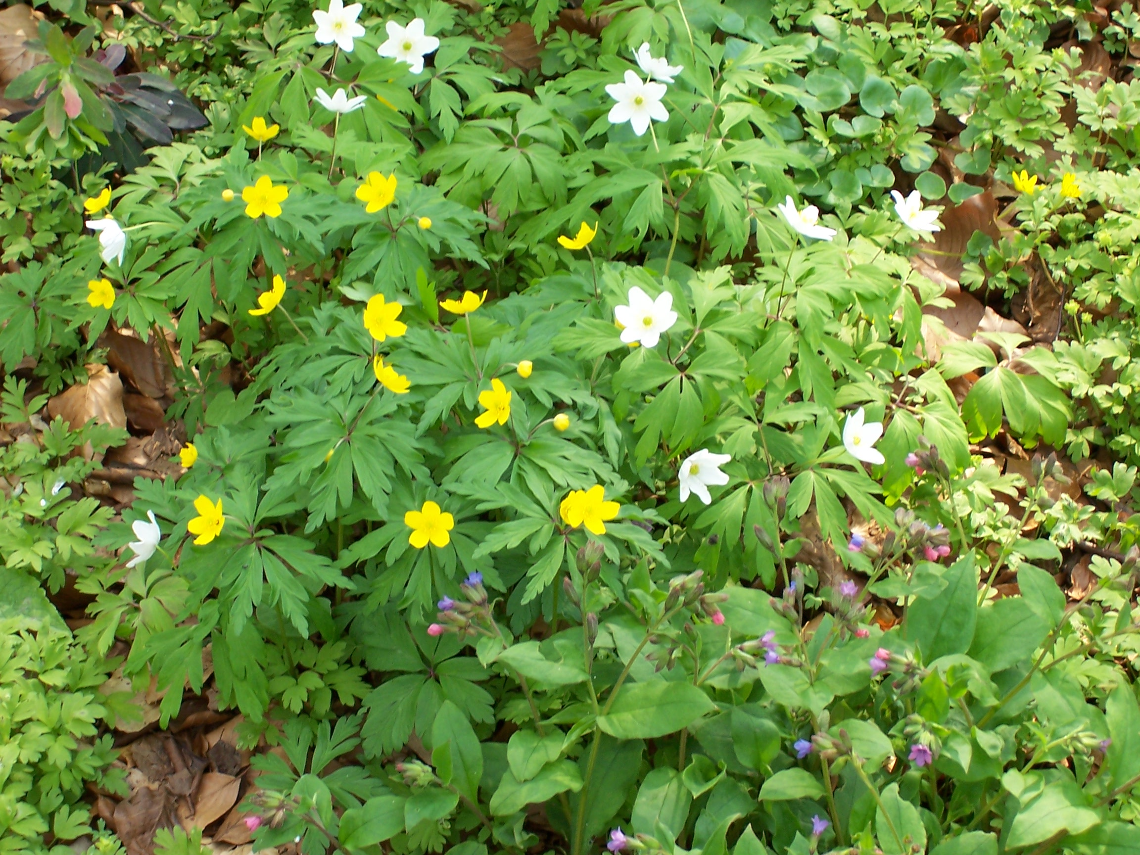 Gelbes Windröschen (Anemone ranunculoides) im Neuen Botanischen Garten Marburg